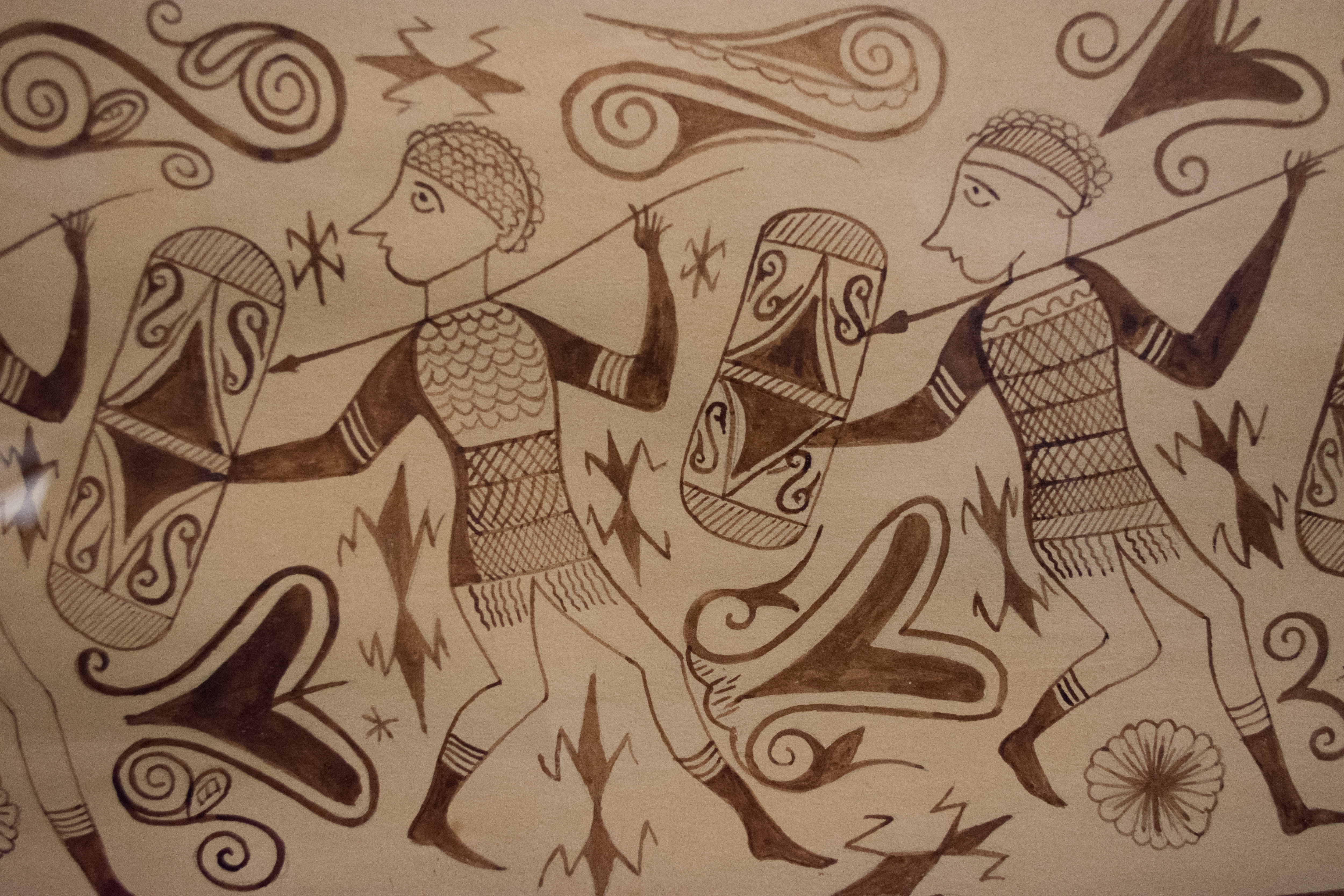 Detalle del Vaso de los Guerreros restaurado en un vinilo (Edeta). Museo de Preshistoria de Valencia.